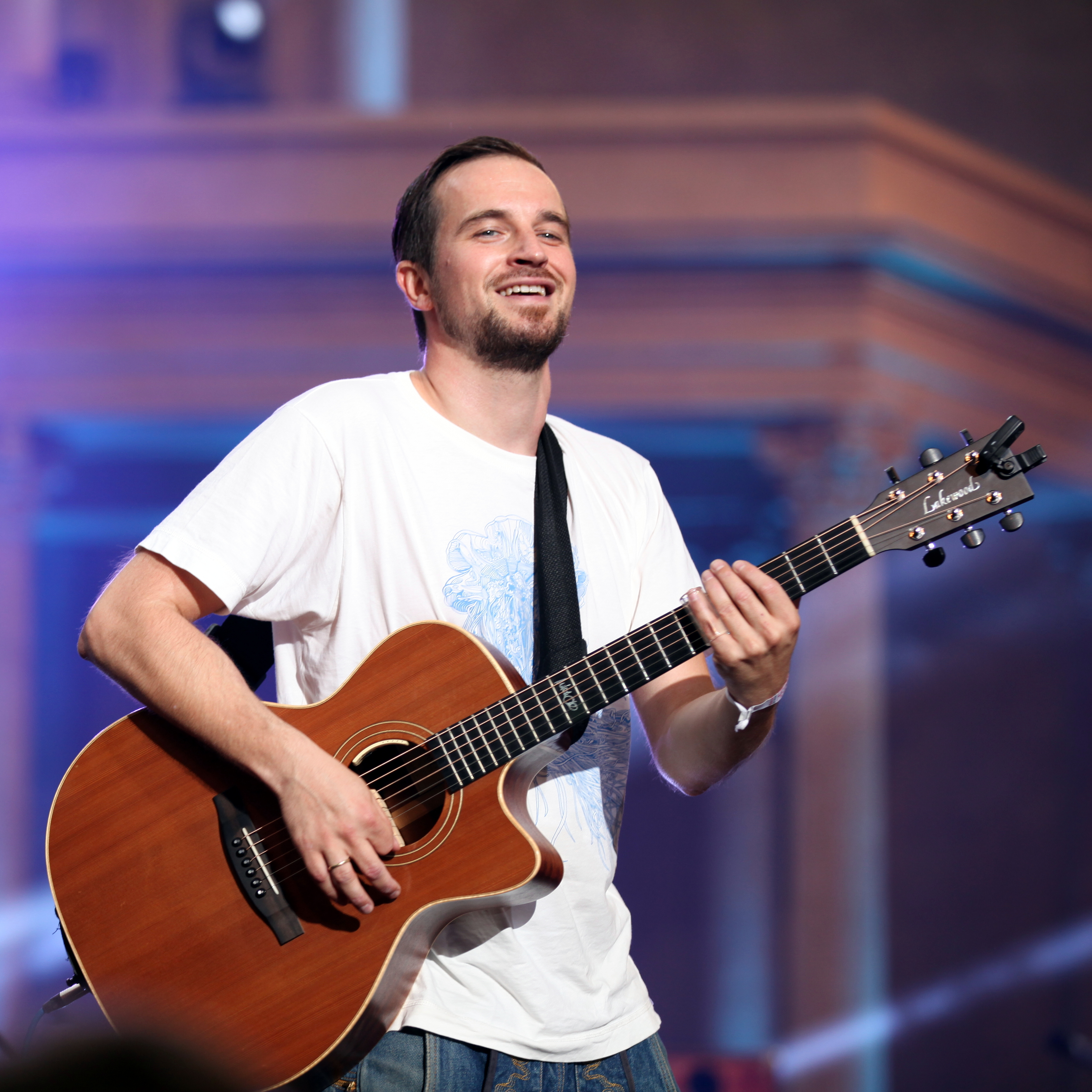 Rainer von Vielen mit Band auf dem Heimatsoundfestival 2015 in Oberammergau. Mitsch Oko (Michael Schönmetzer, Gitarre) Gesang, Akkordeon, Gitarre: Rainer von Vielen (Rainer Hartmann) Gitarre: Mitsch Oko (Michael Schönmetzer) Bassgitarre: Dan Le Tard (Daniel Schubert) Schlagzeug: Sebastian Schwab